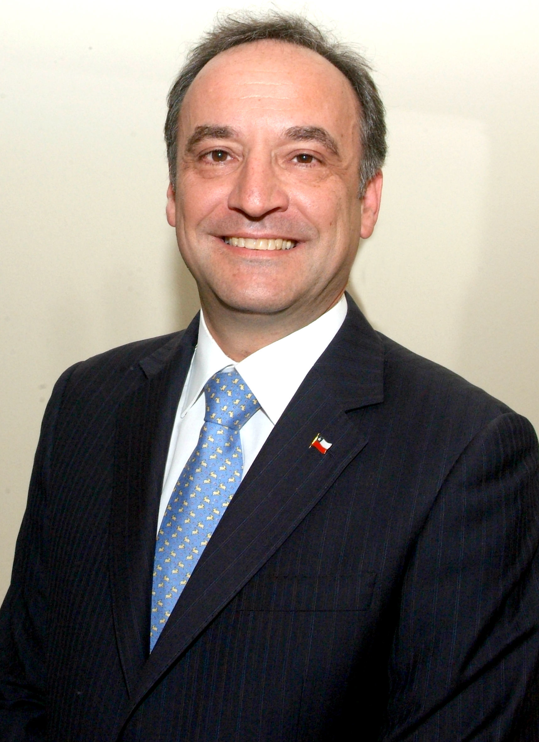 Juan Antonio Peribonio, intendente de la Región Metropolitana de Santiago.